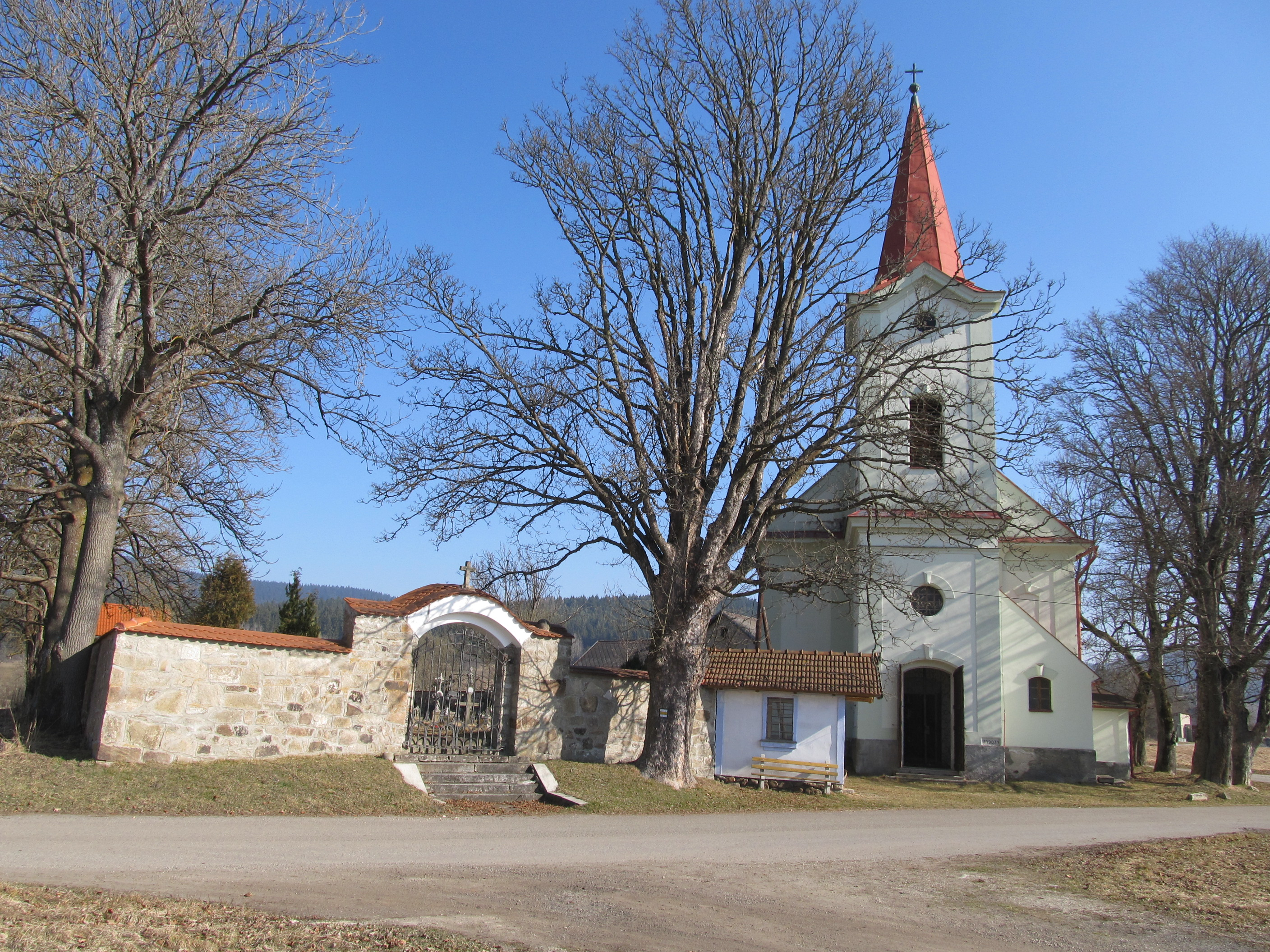 Pěkná - kostel svaté Anny